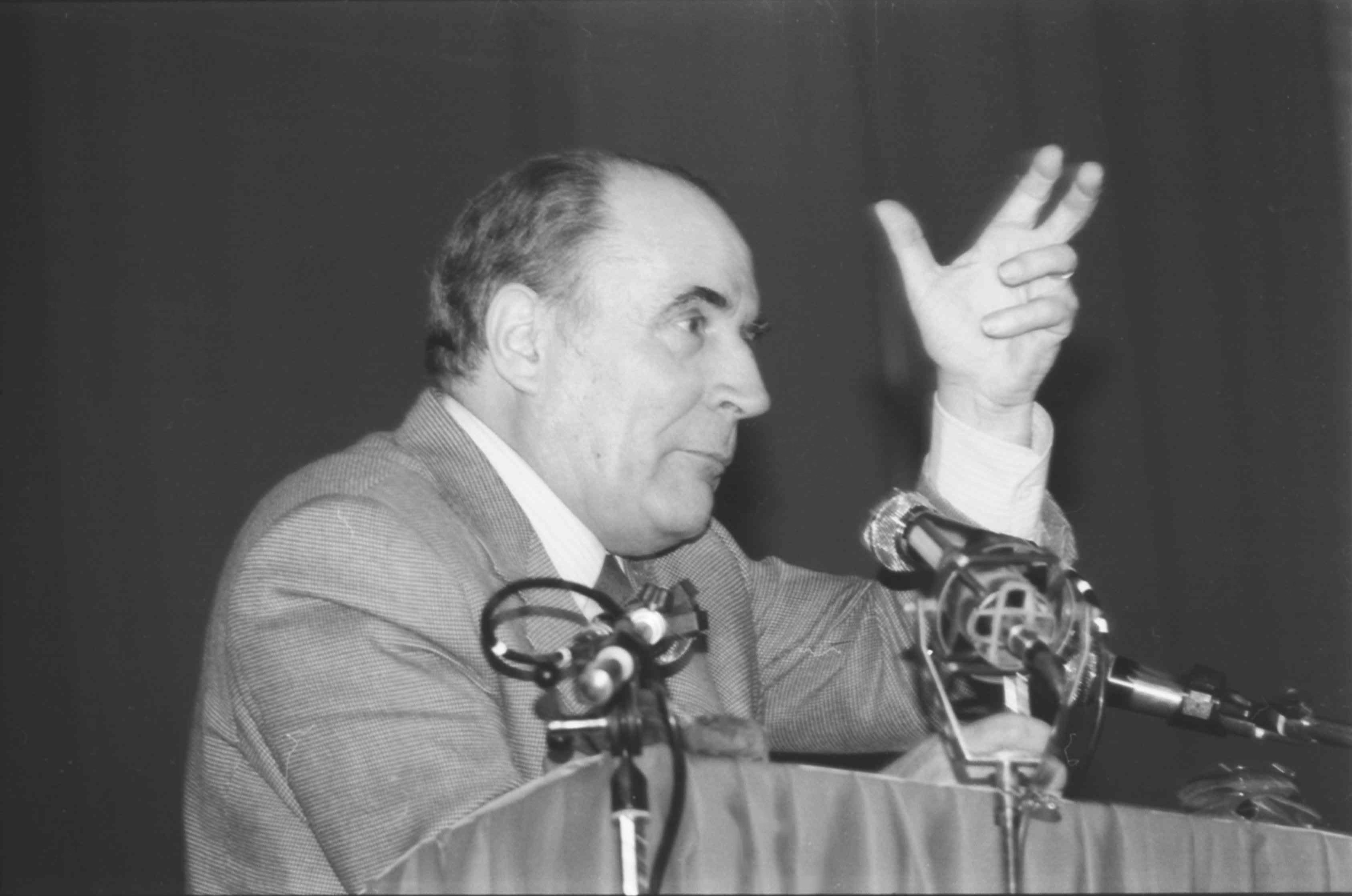 Meeting de François MITTERRAND à CAEN lors de la campagne des présidentielles de 1981.